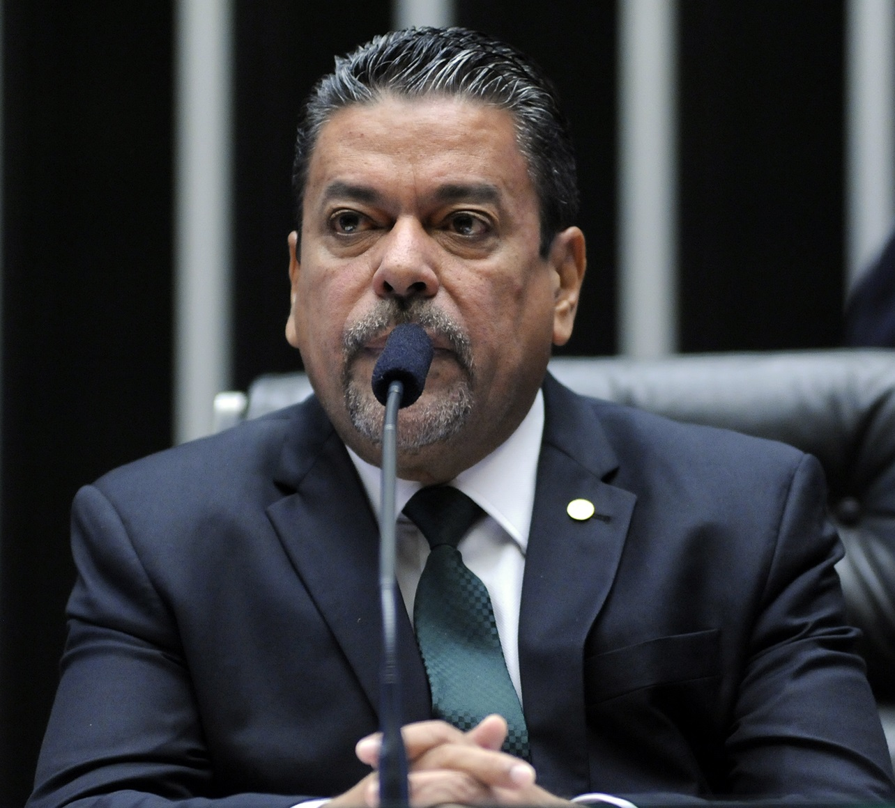 Hiran Gonçalves em outubro de 2016.